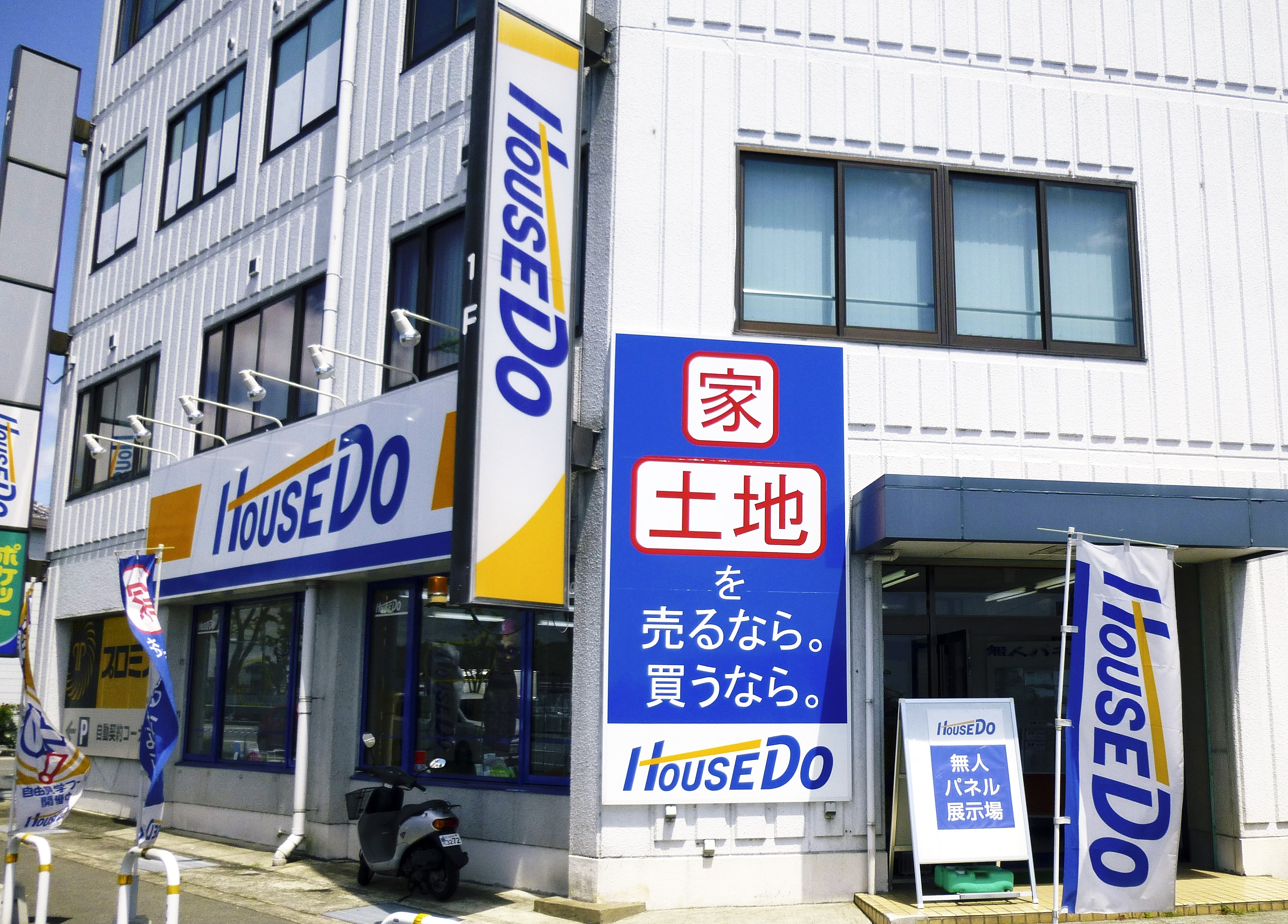 ハウスドゥ！北播磨店 外観